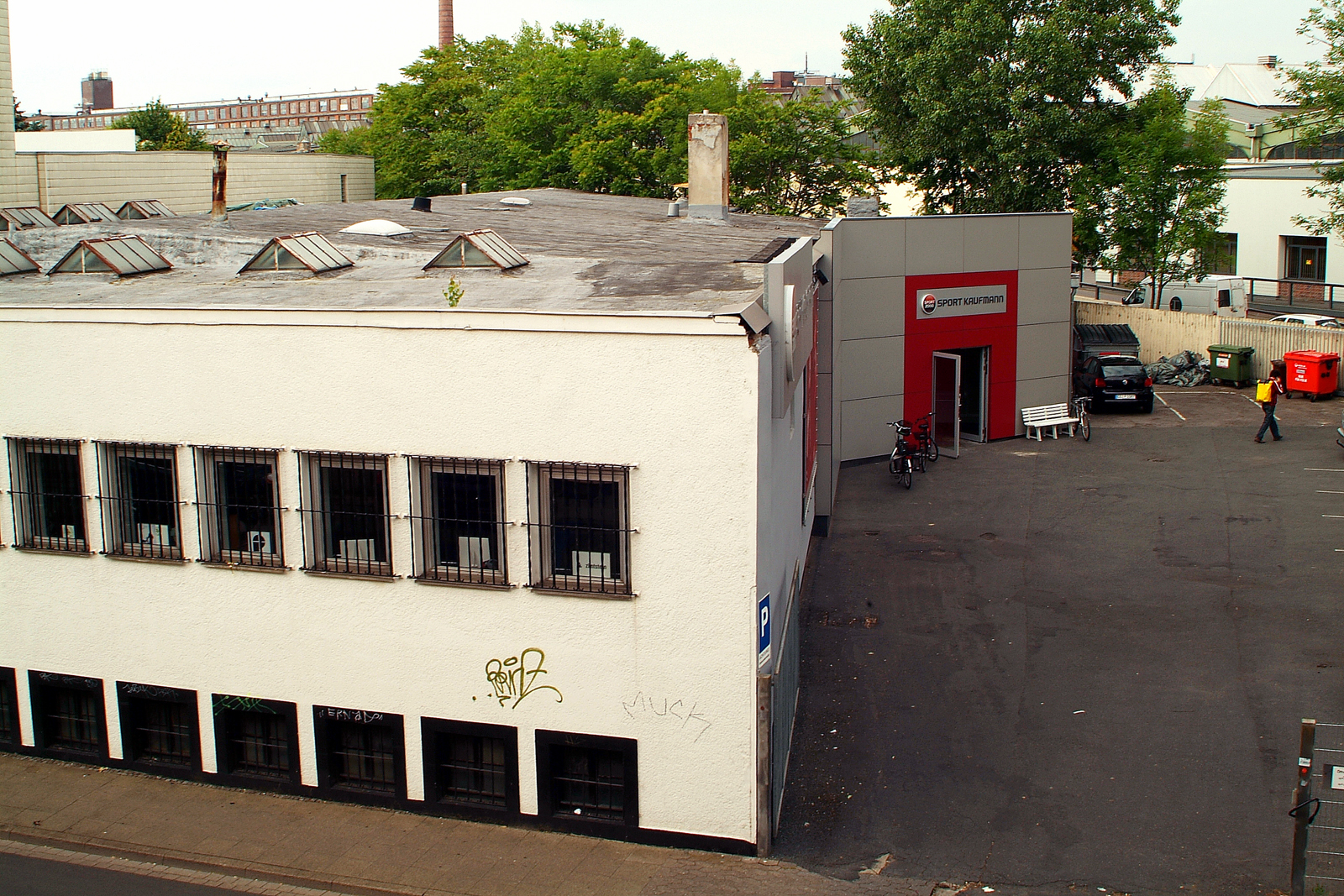 Gebäude der ehemaligen Wilh. Boetticher, mechanische Weberei und Kleiderfabrik, Weidendamm 6 Hannover, jetzt Sport Kaufmann ...